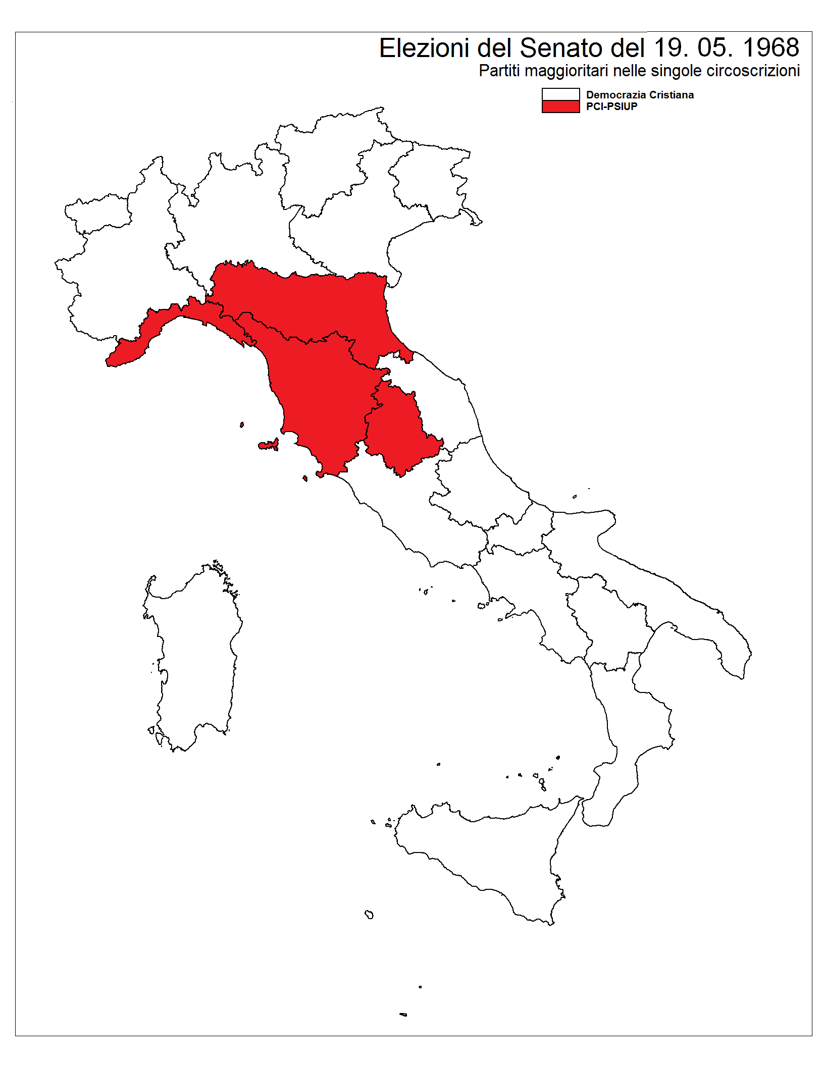 Partiti maggioritari nelle singole circoscrizioni nelle elezioni del 1968.